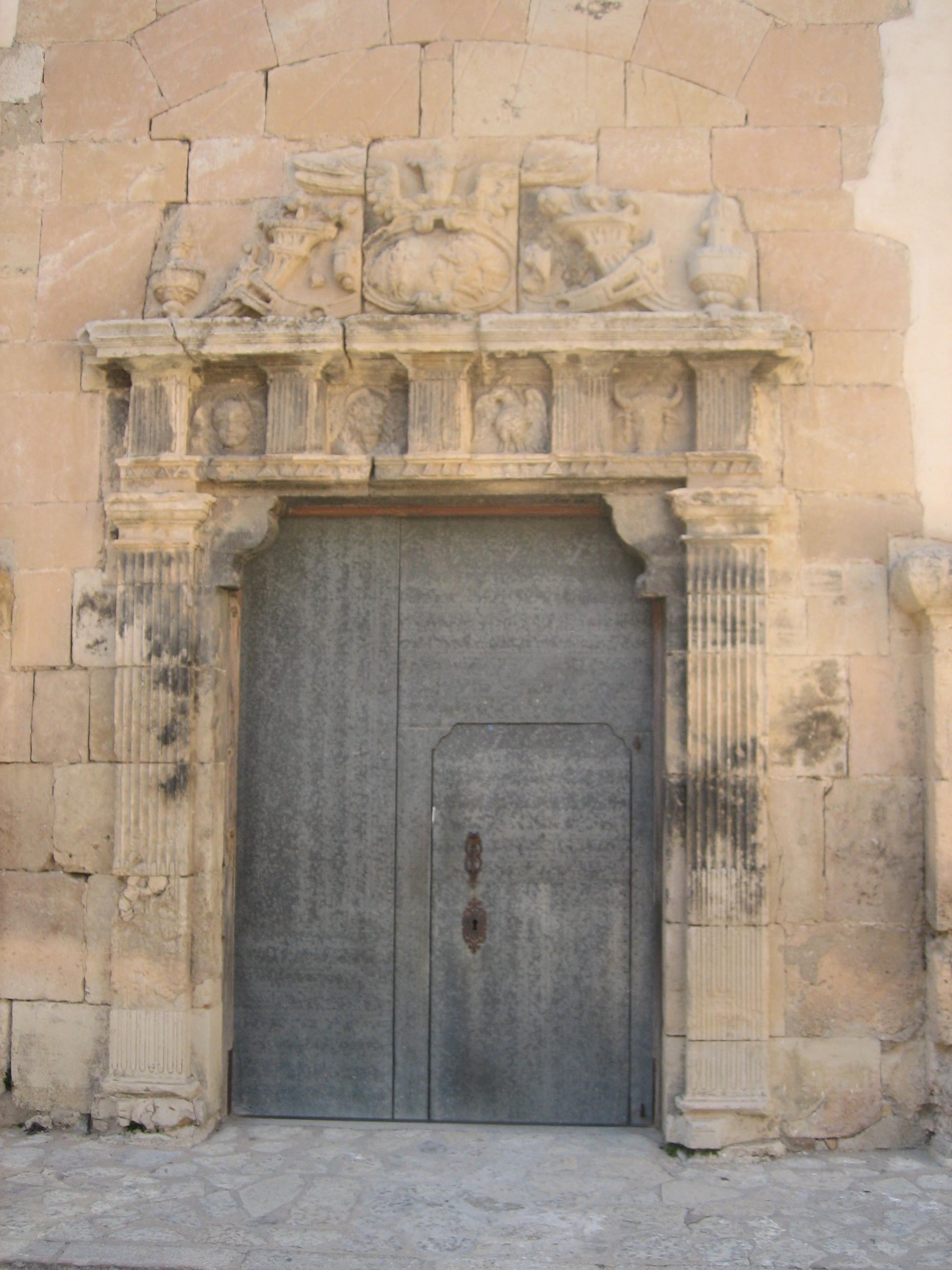 Portada lateral de l'església de Santa Maria Magdalena de Vilafranca (Alt Maestrat)